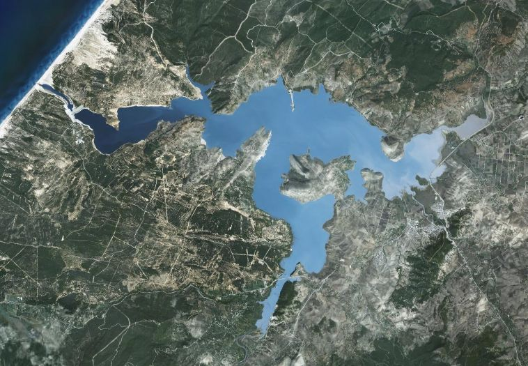 Image satellite du barrage Sidi El Barraq, près de Nefza, Tunisie